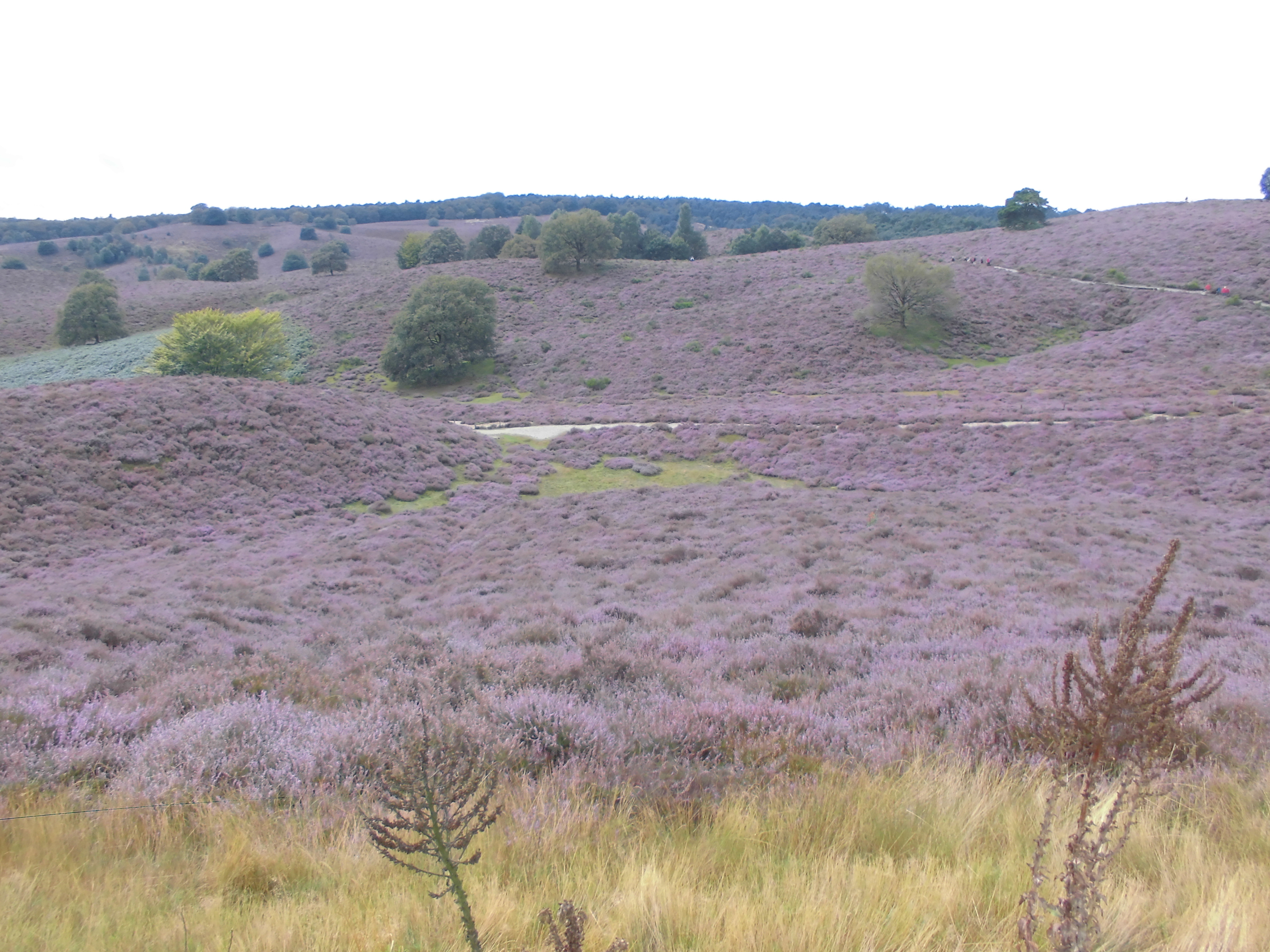 Heide in bloei bij De Posbank